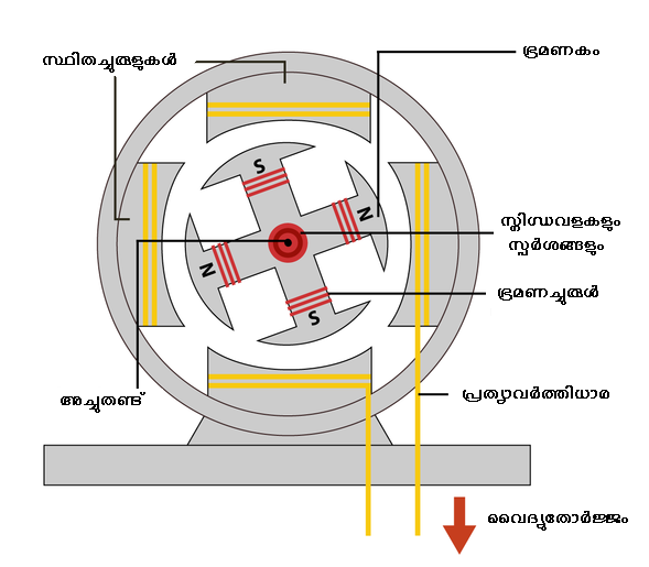 വൈദ്യുതജനിത്രം - ഒരു ലഘുഛേദതലക്കാഴ്ച